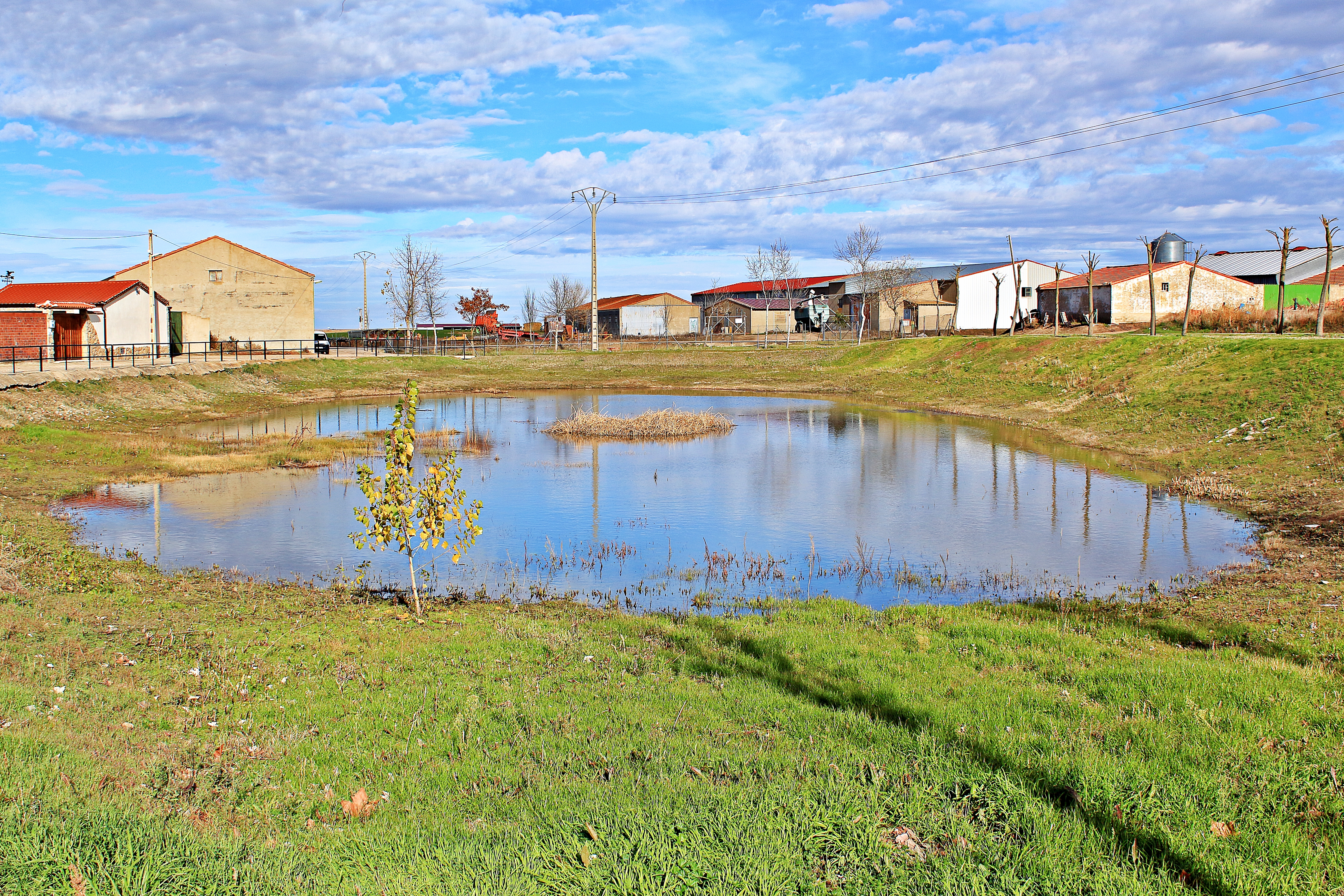 El Campo de Peñaranda municipio de la comarca Tierra de Peñaranda, provincia de Salamanca.